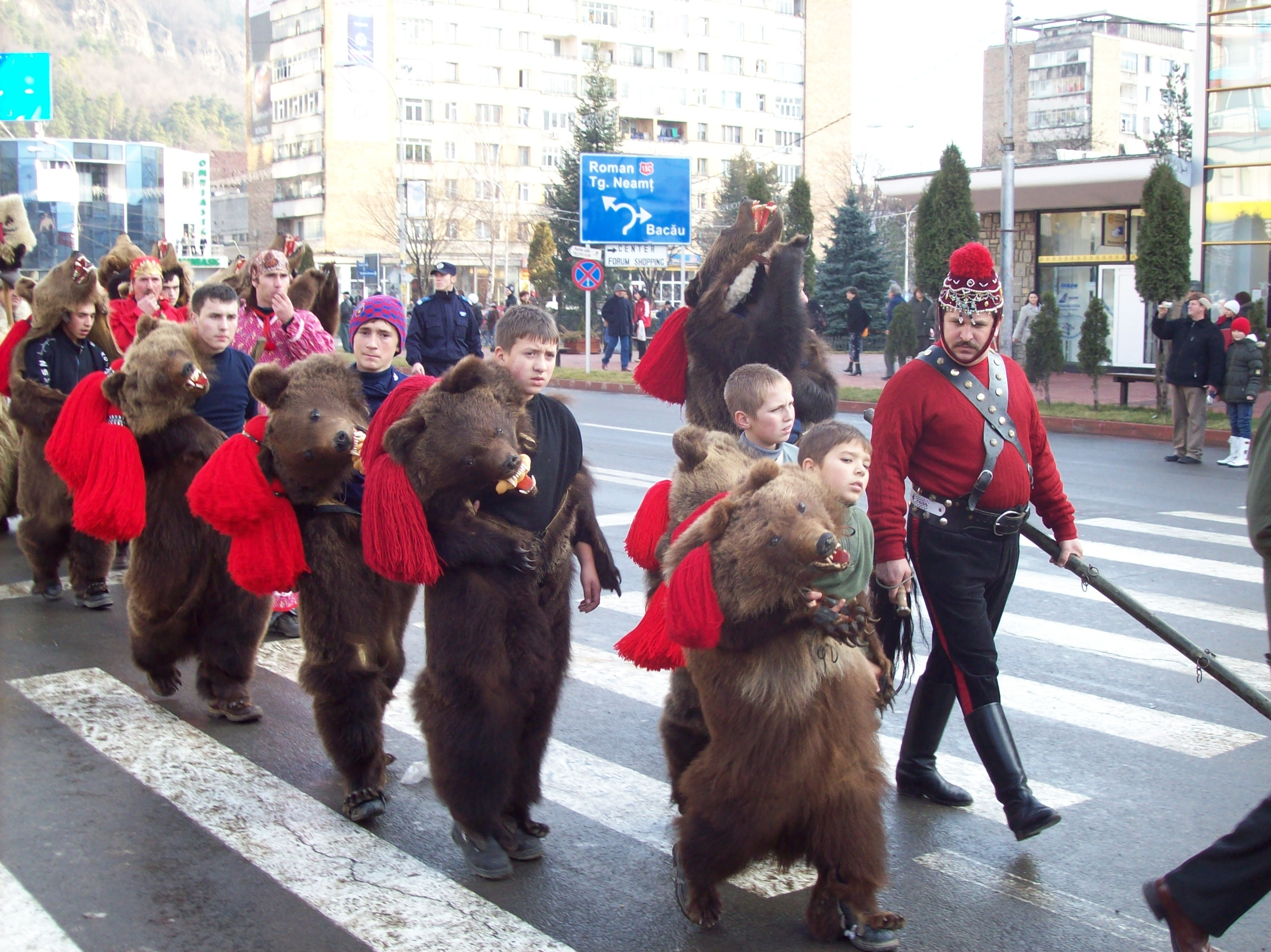 Parada „Urșilor” din Asău din județul Bacău, Moldova